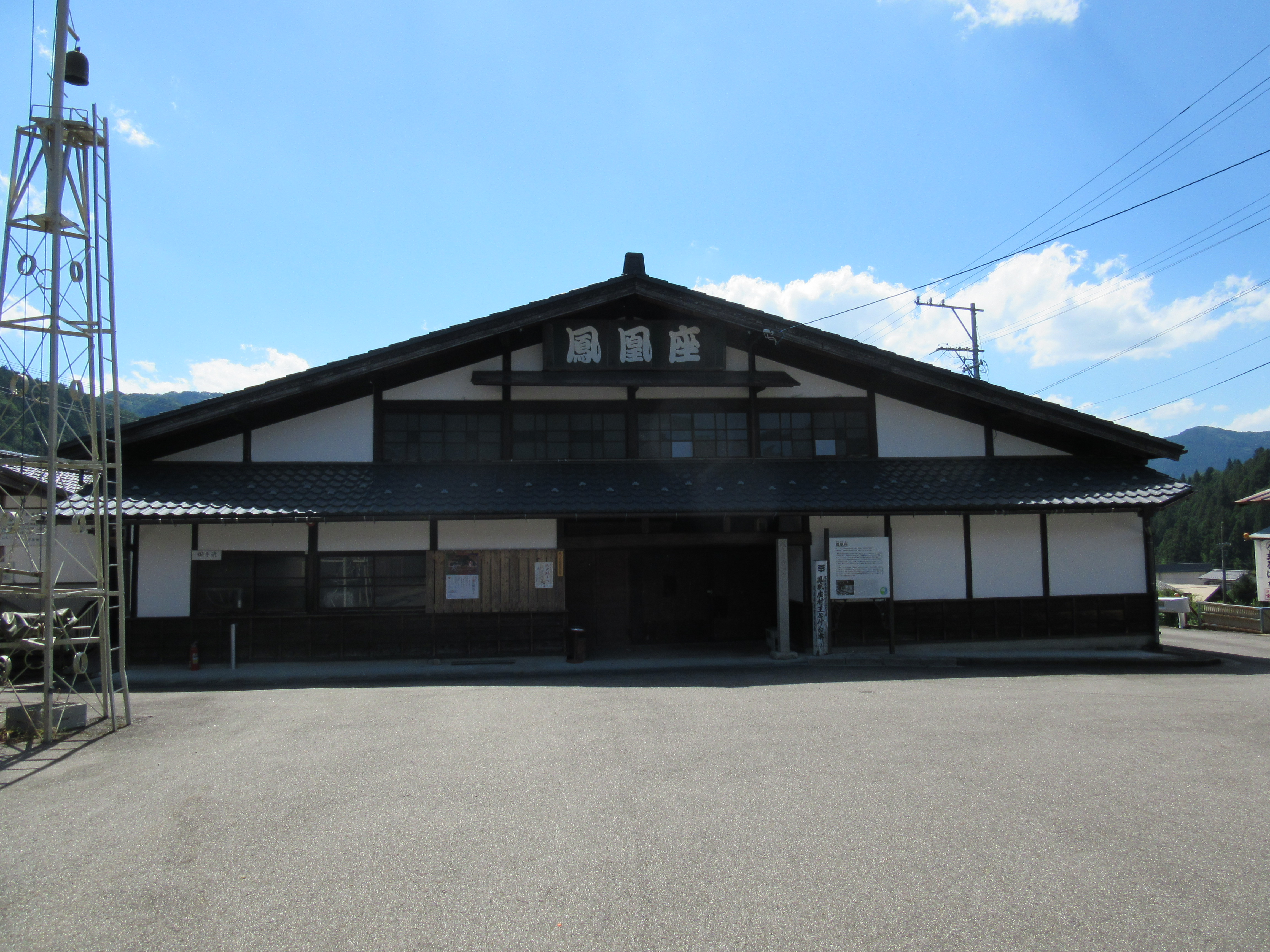 鳳凰座 (岐阜県下呂市)